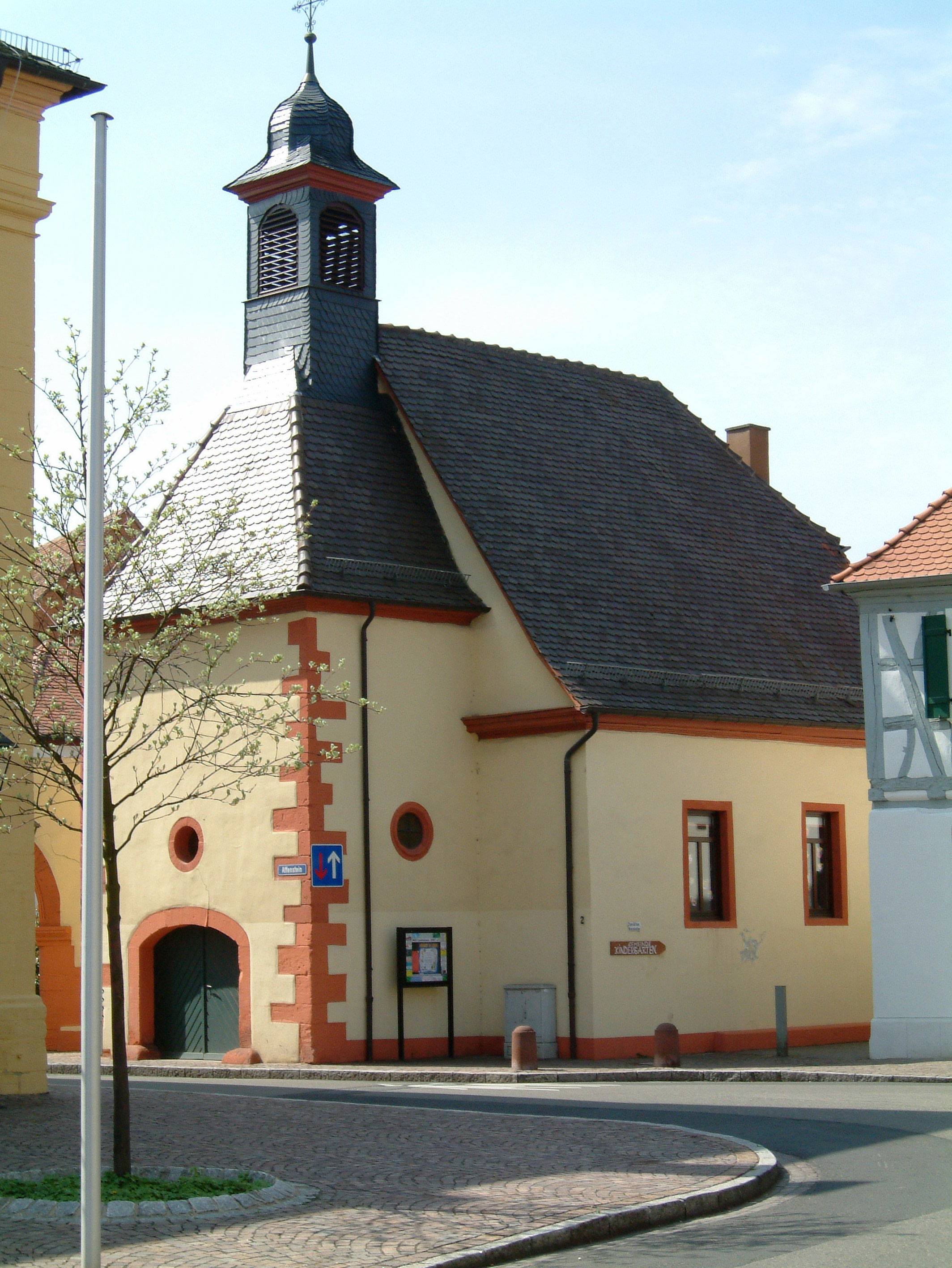 Spitalhof (Kapelle St. Maria Magdalena) zu Dirmstein, selbst fotografiert am 24.04.2006 und freigegeben durch Benutzer:Mundartpoet